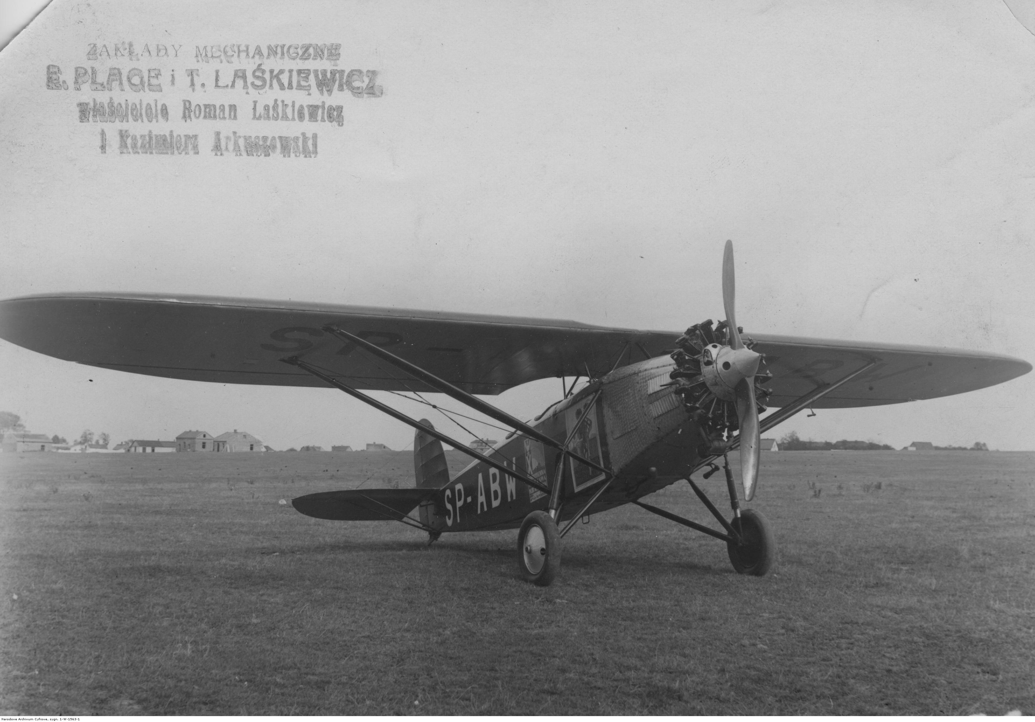 Samolot propagandowy Powszechnej Wystawy Krajowej w Poznaniu Lublin R-X SP-ABW.